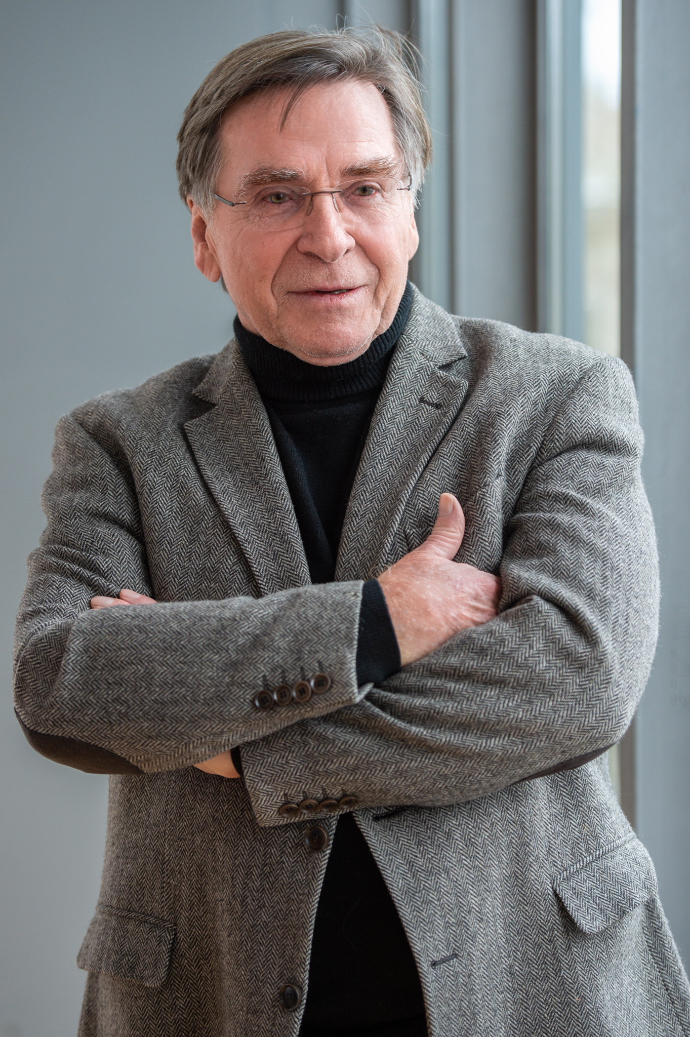 BR,Bayerischer Rundfunk,Bayerisches Fernsehen,Elmar Wepper,Filmbrunch 2019,Literaturhaus München